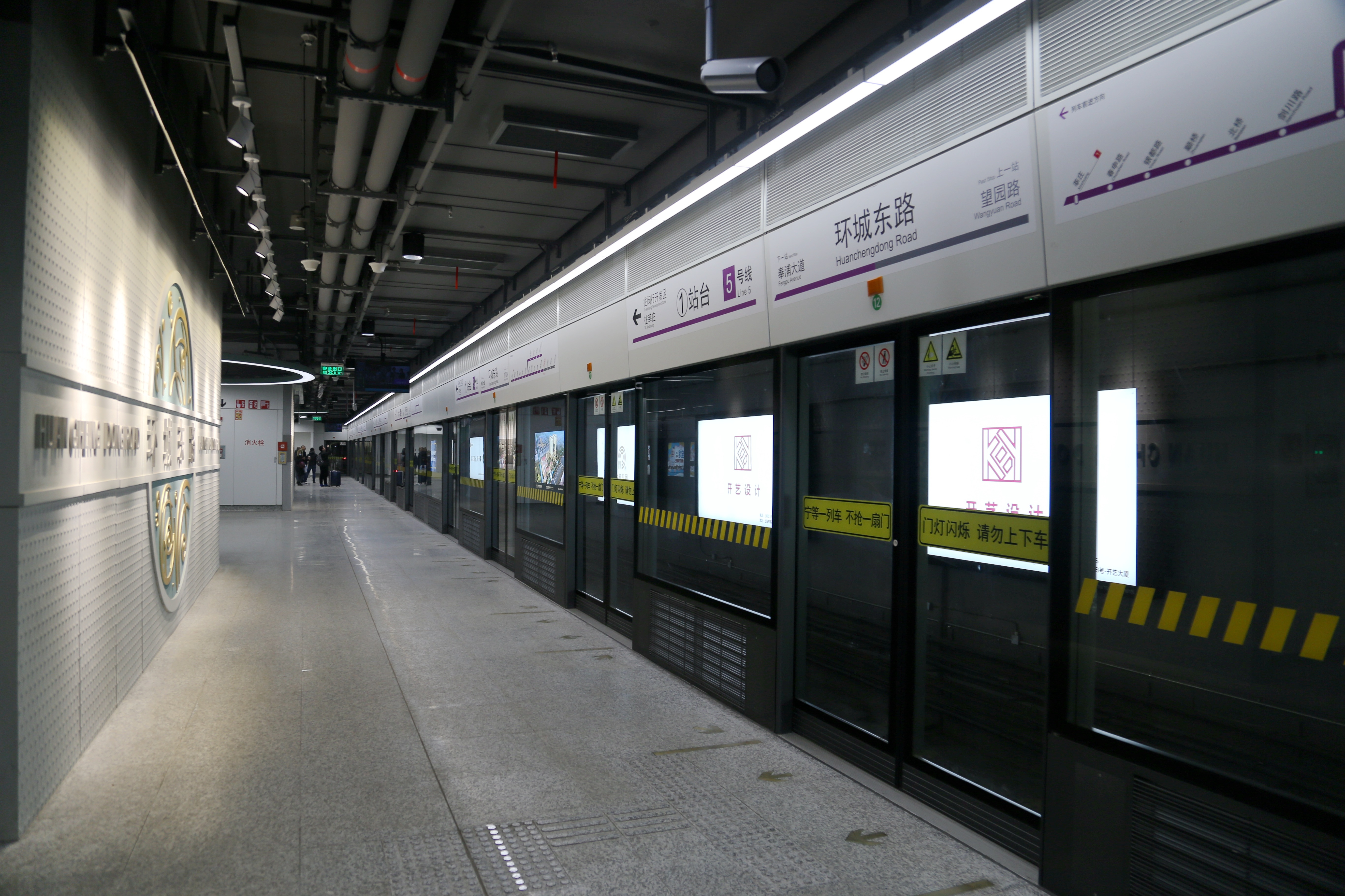 环城东路站站台